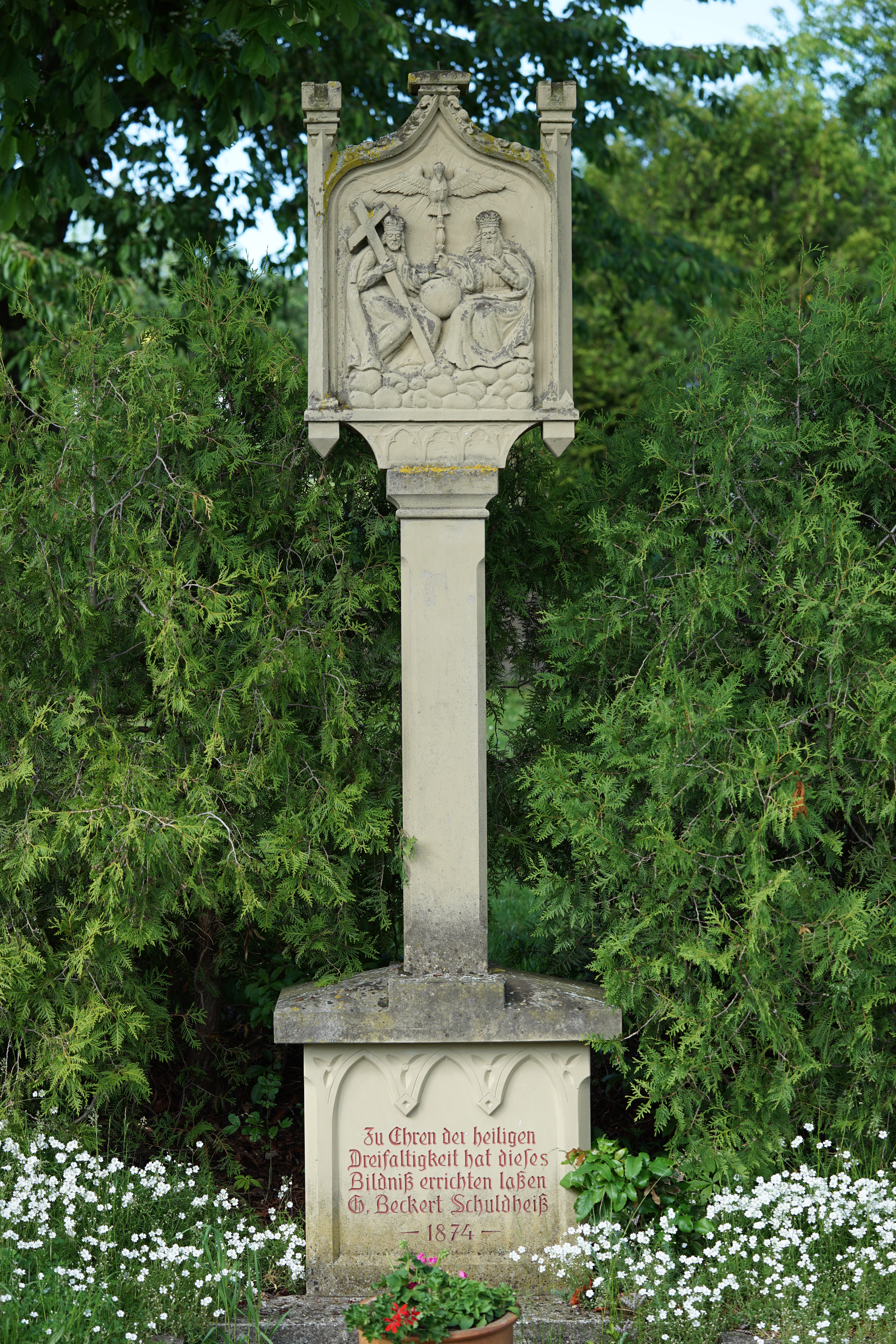 Dörzbach (Hohenlohekreis), Ortsteil Meßbach: historischer Bildstock mit Darstellung der Heiligen Dreifaltigkeit (Trinität) an der Siedlungsstraße.